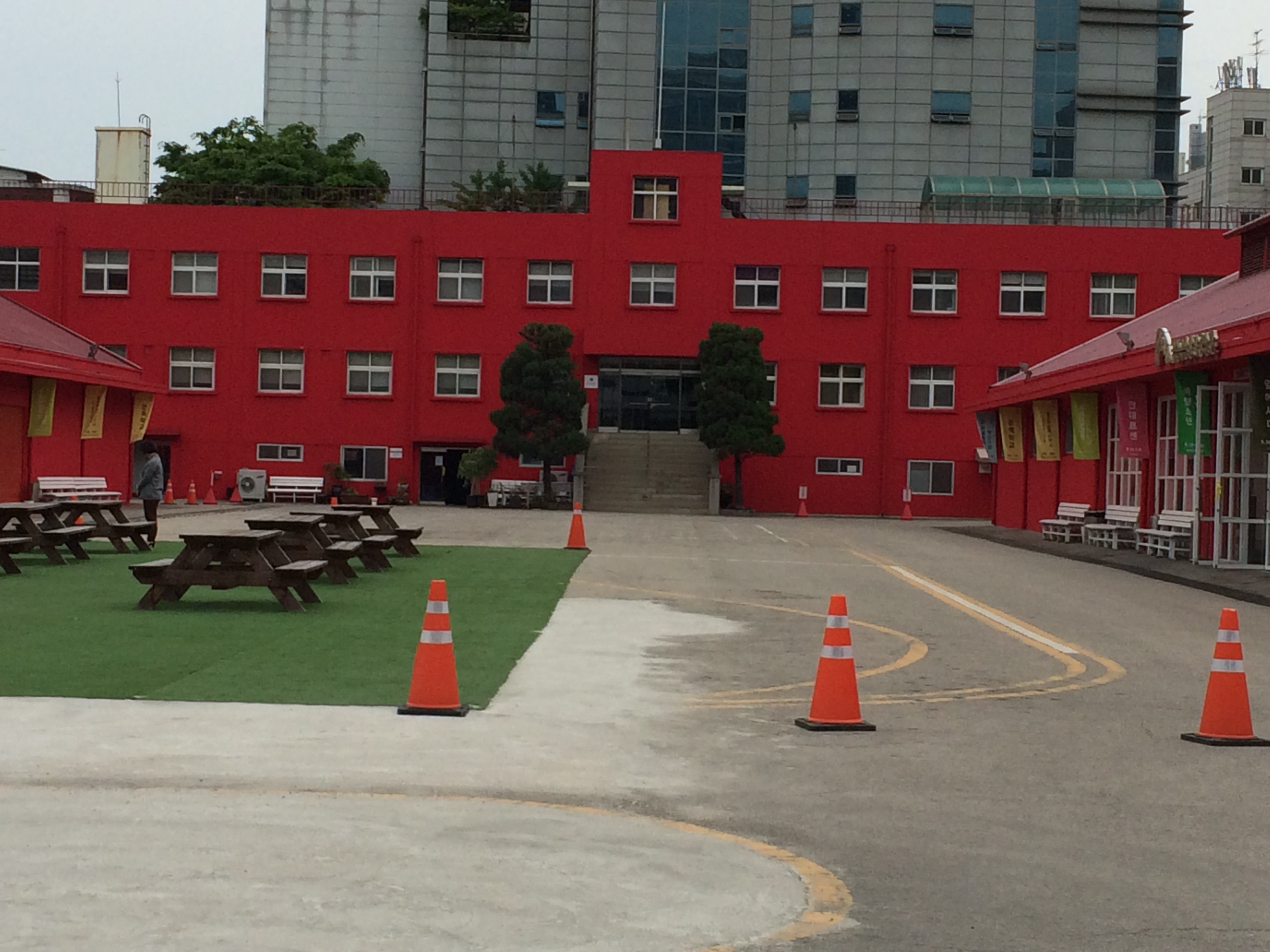 국립국단, 서울 용산구 청파로